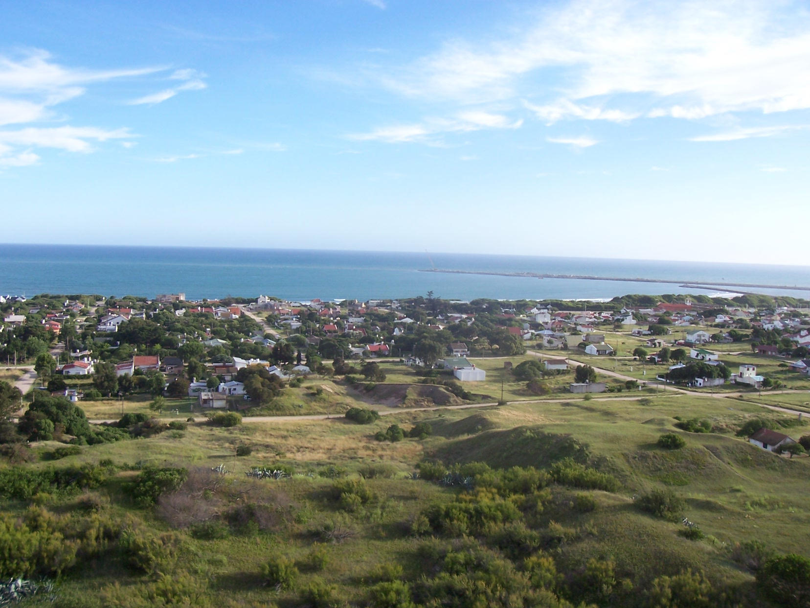 Vista de la ciudad de Quequén, en la provincia de Buenos Aires. Tomada desde el Faro.